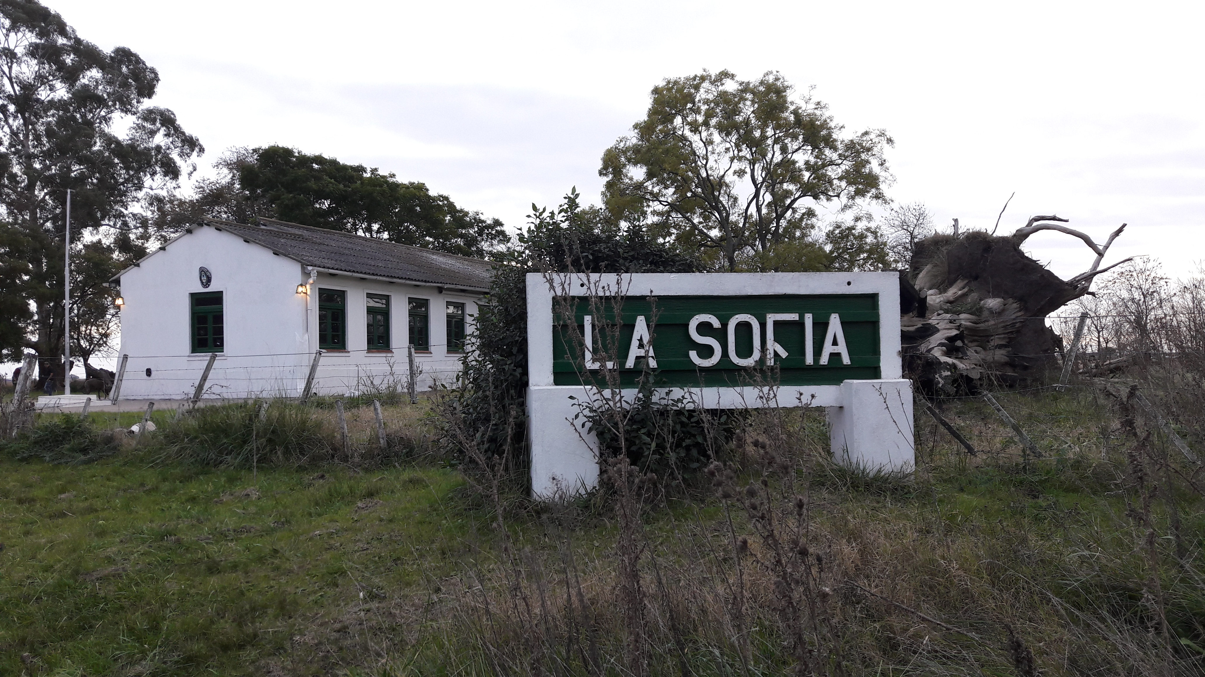 Carlos Casares Partido, Buenos Aires Province, Argentina